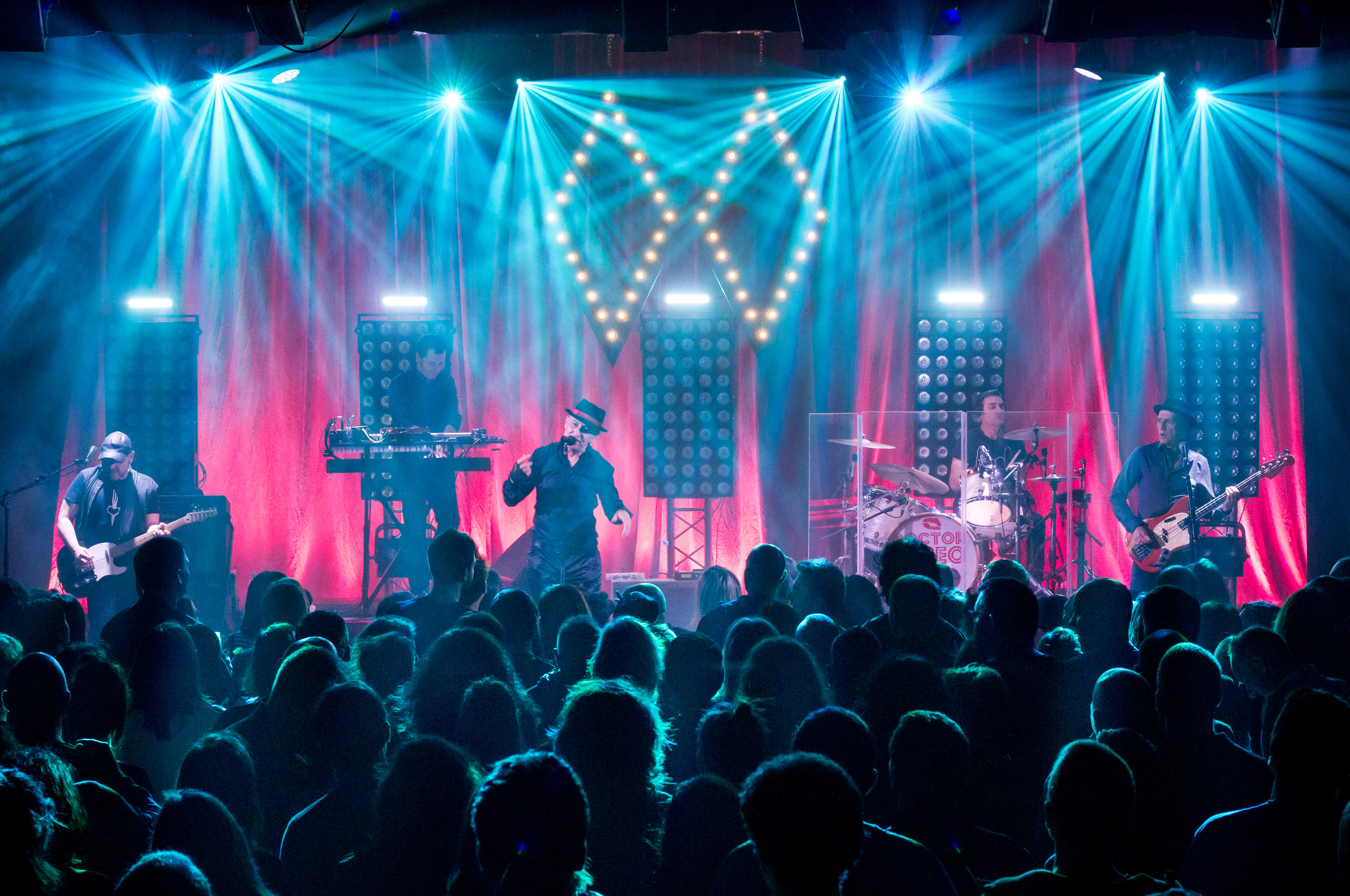 Dkluba Intxaurrondo Kultur Etxea 2018/5/11 Argazkiak/Fotos: Iñigo Ibañez